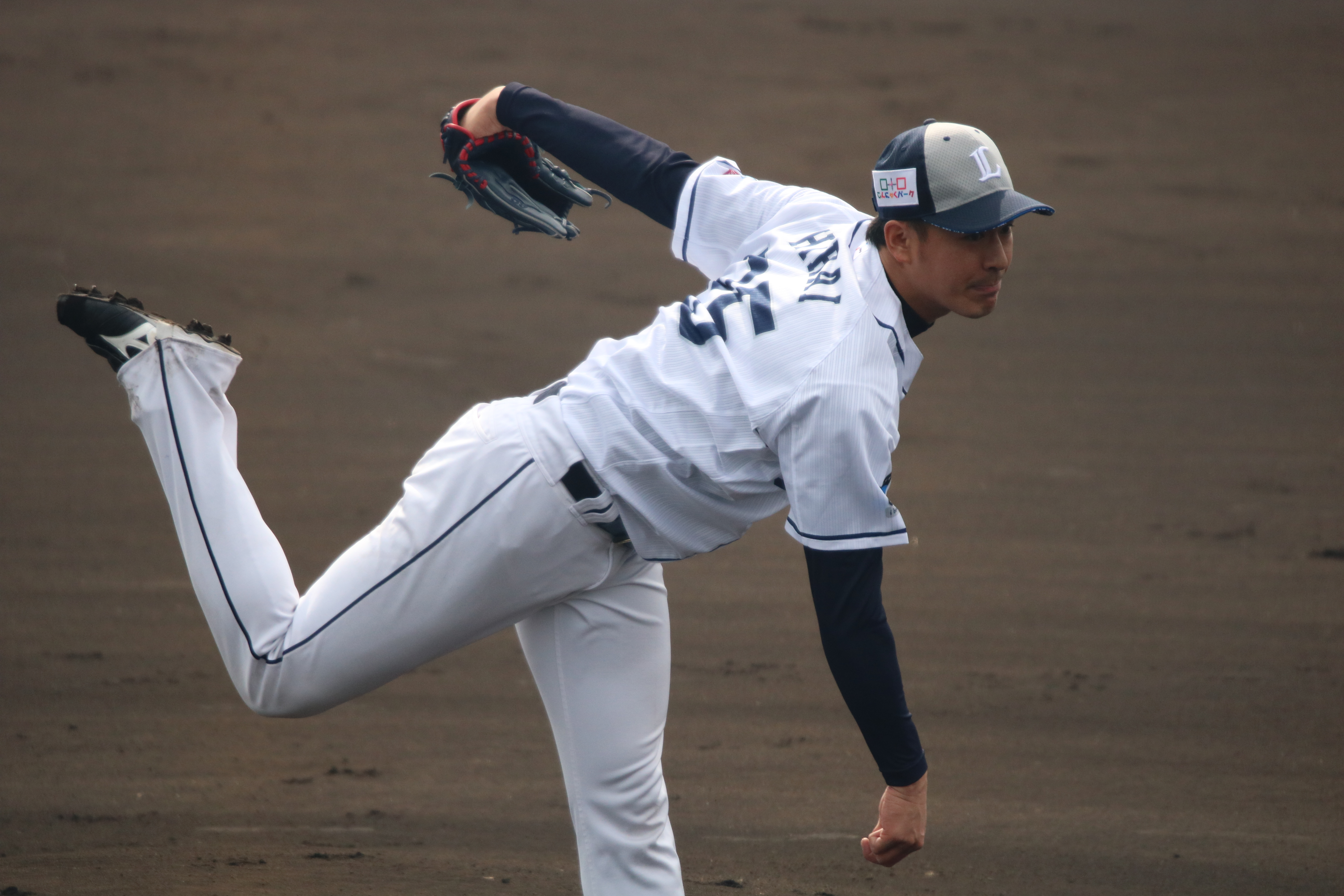 2018/2/9 宮崎・南郷キャンプ